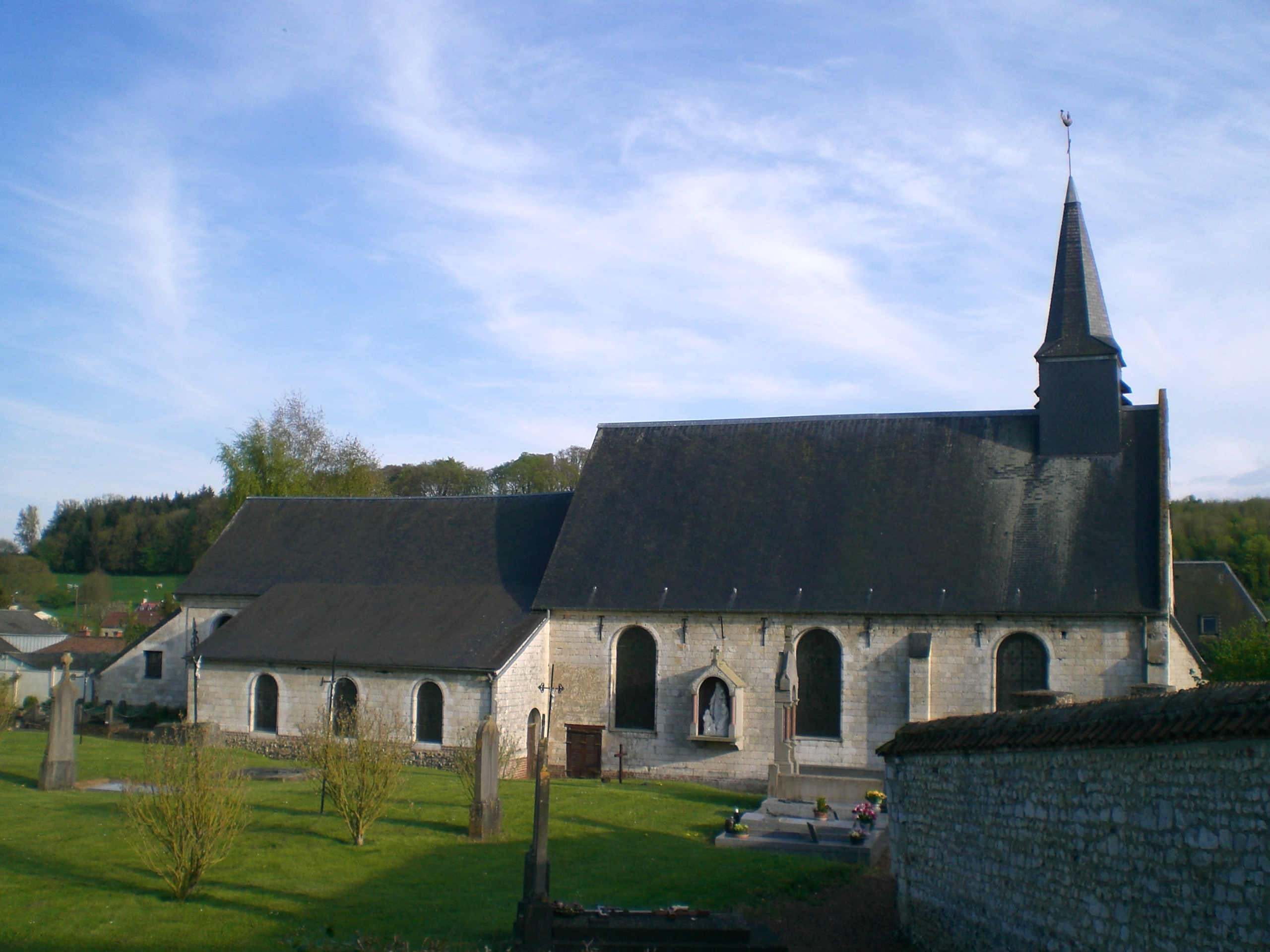 Authie (Somme) en avril 2014